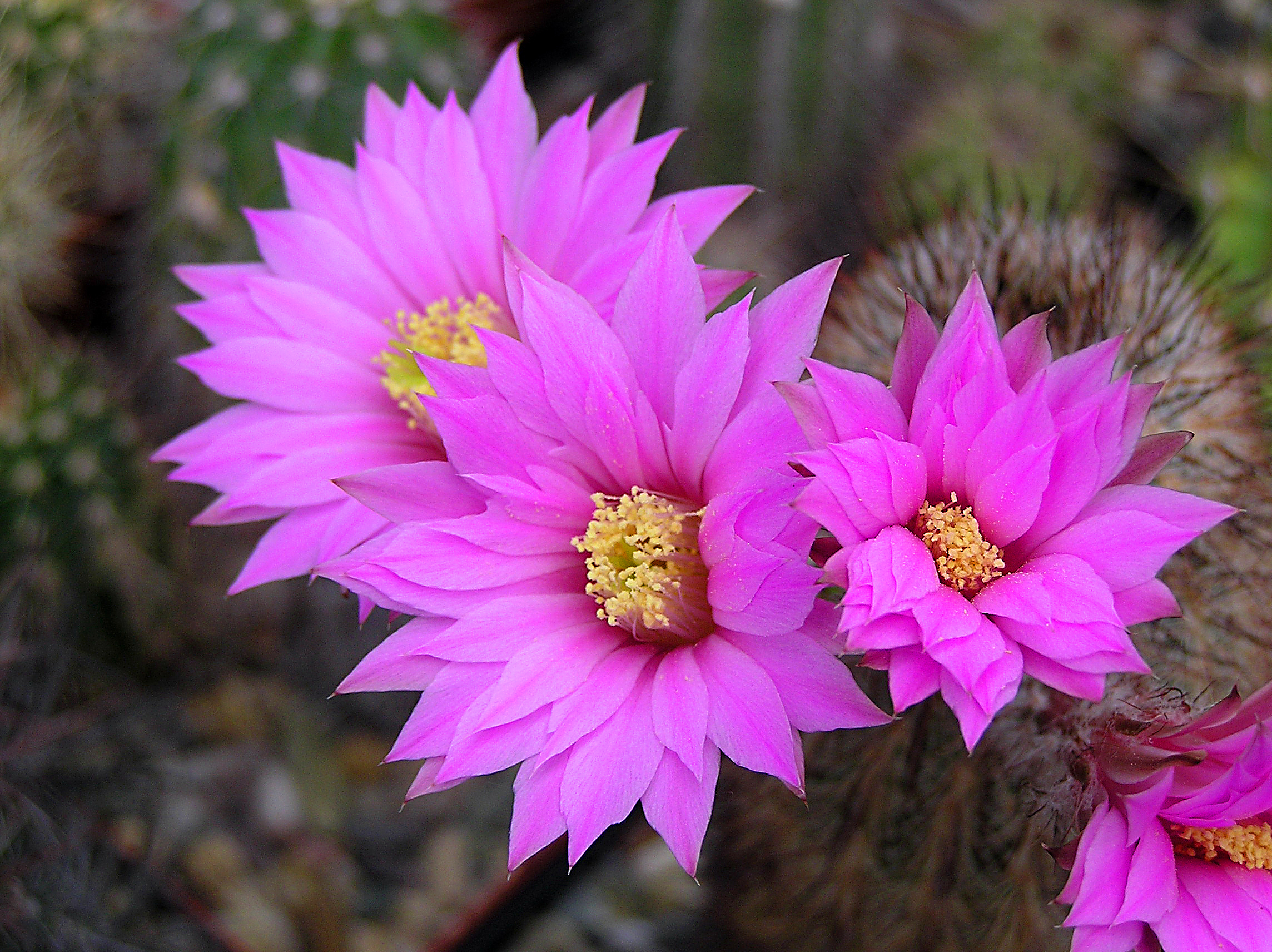 Echinocereus lauii (G.Frank)